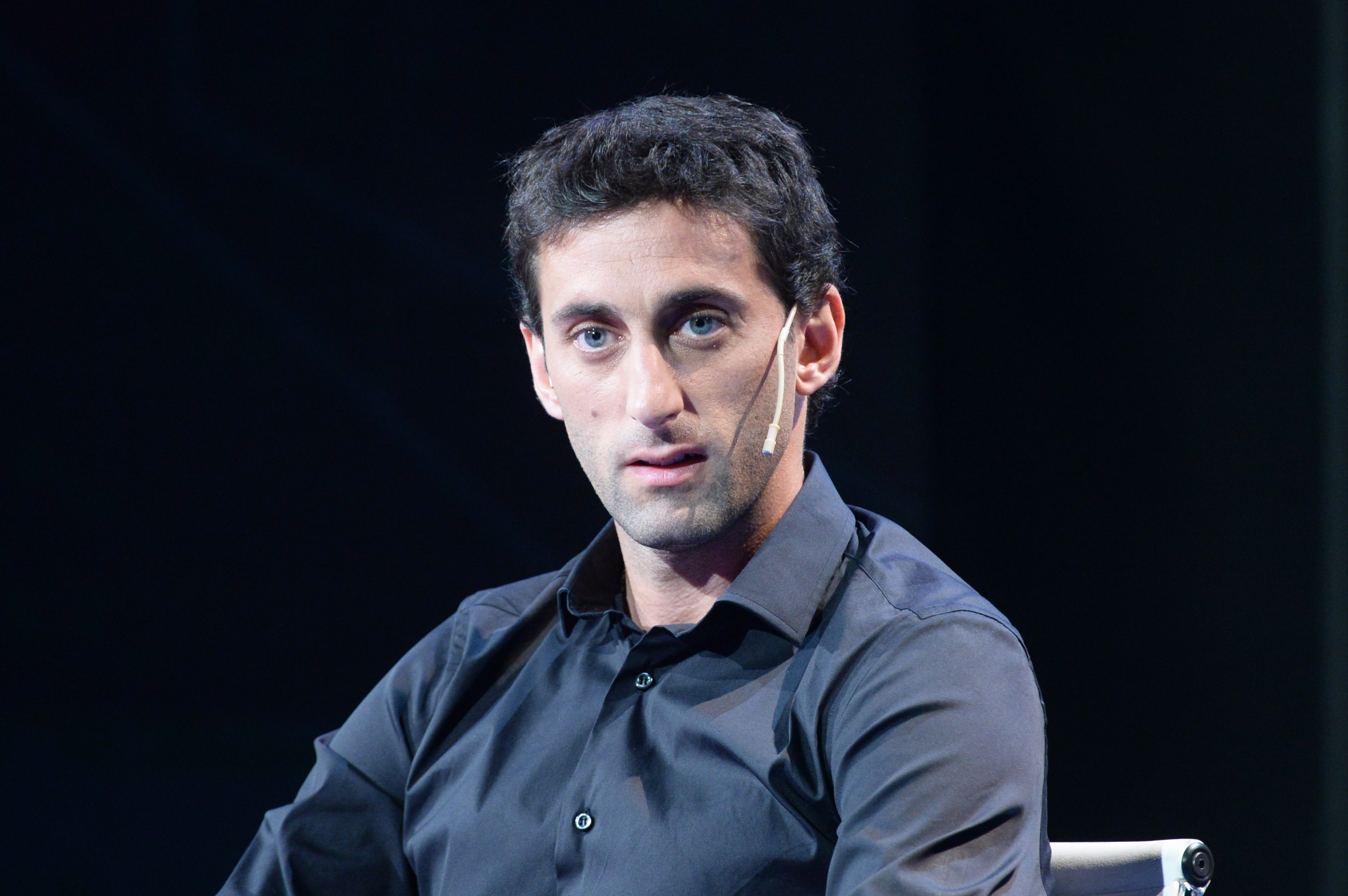 Diego Milito